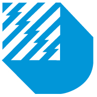 Le logo officiel de la SEBJ était bleu sur tous les véhicules, papeterie et signalisation.